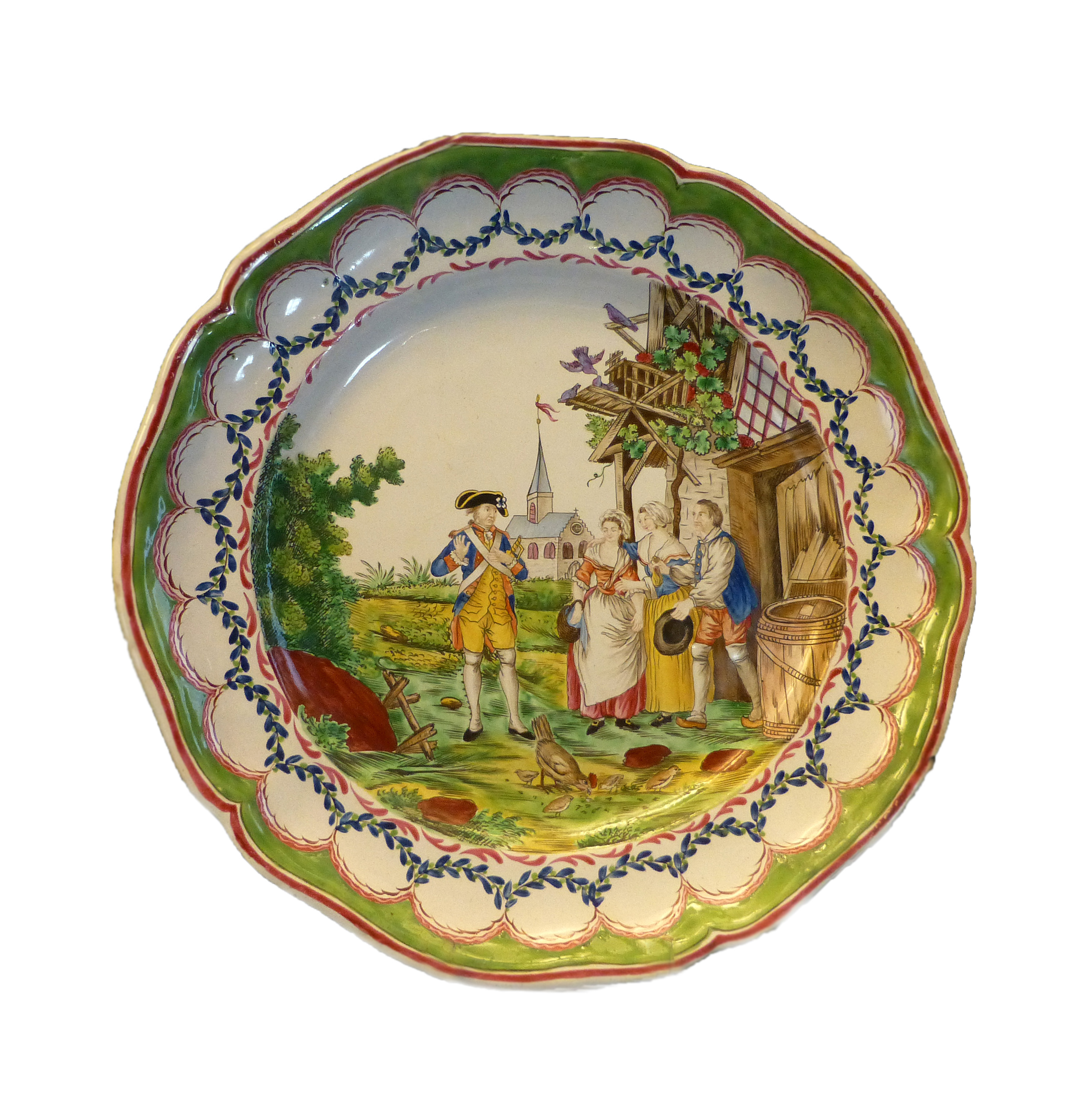 Plat. Faïence de petit feu. Histoire du Maréchal des logis Gillet : la récompense. Manufacture des Islettes. Musée Lorrain